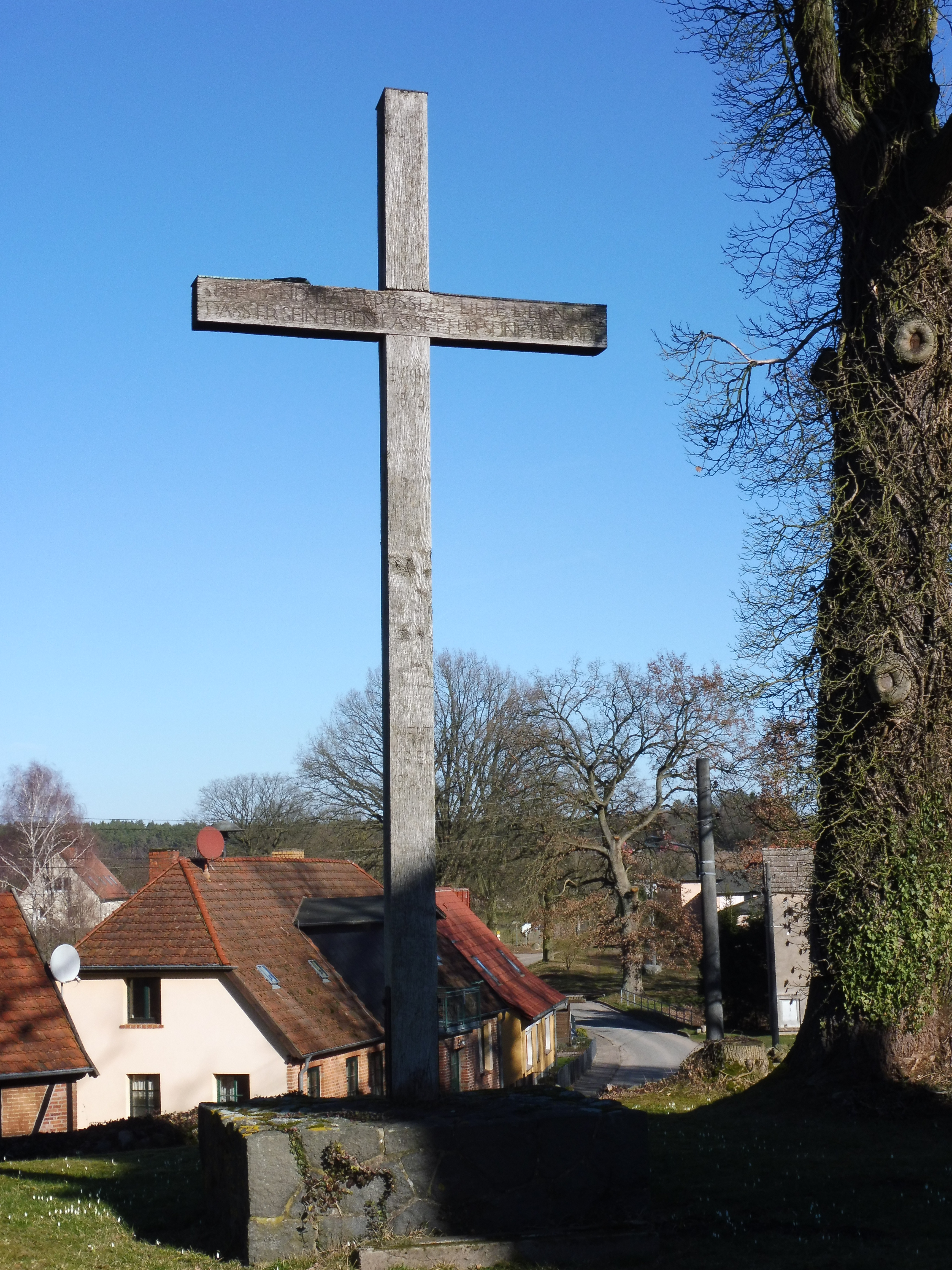 Kreuz für die Gefallenen des Ersten Weltkrieges bei der Dorfkirche Stuer. Die Inschrift auf dem Querbalken ist: NIEMAND HAT GRÖSSERE LIEBE ALS DIE, DASS ER SEIN LEBEN LÄSST FÜR SEINE FREUNDE (Joh. 15,13)